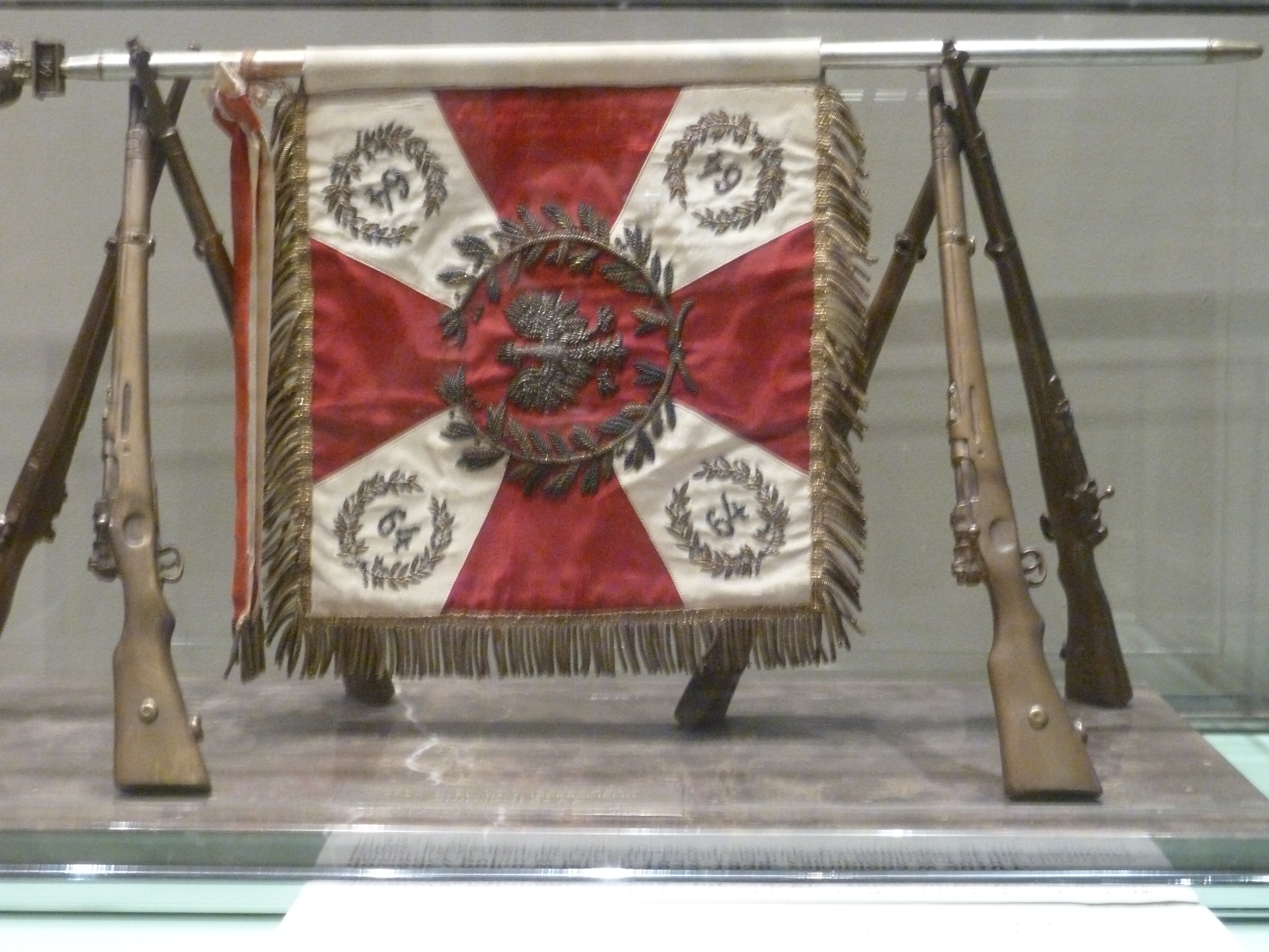 Miniatura sztandaru 64 Pomorskiego Pułku Piechoty Strzelców Murmańskich ofiarowana płk dypl. Ignacemu Izdebskiemu, dowódcy pułku w latach 1932 - 1938, zakupiona w 2010 r. przez Muzeum Wojska Polskiego w Warszawie.